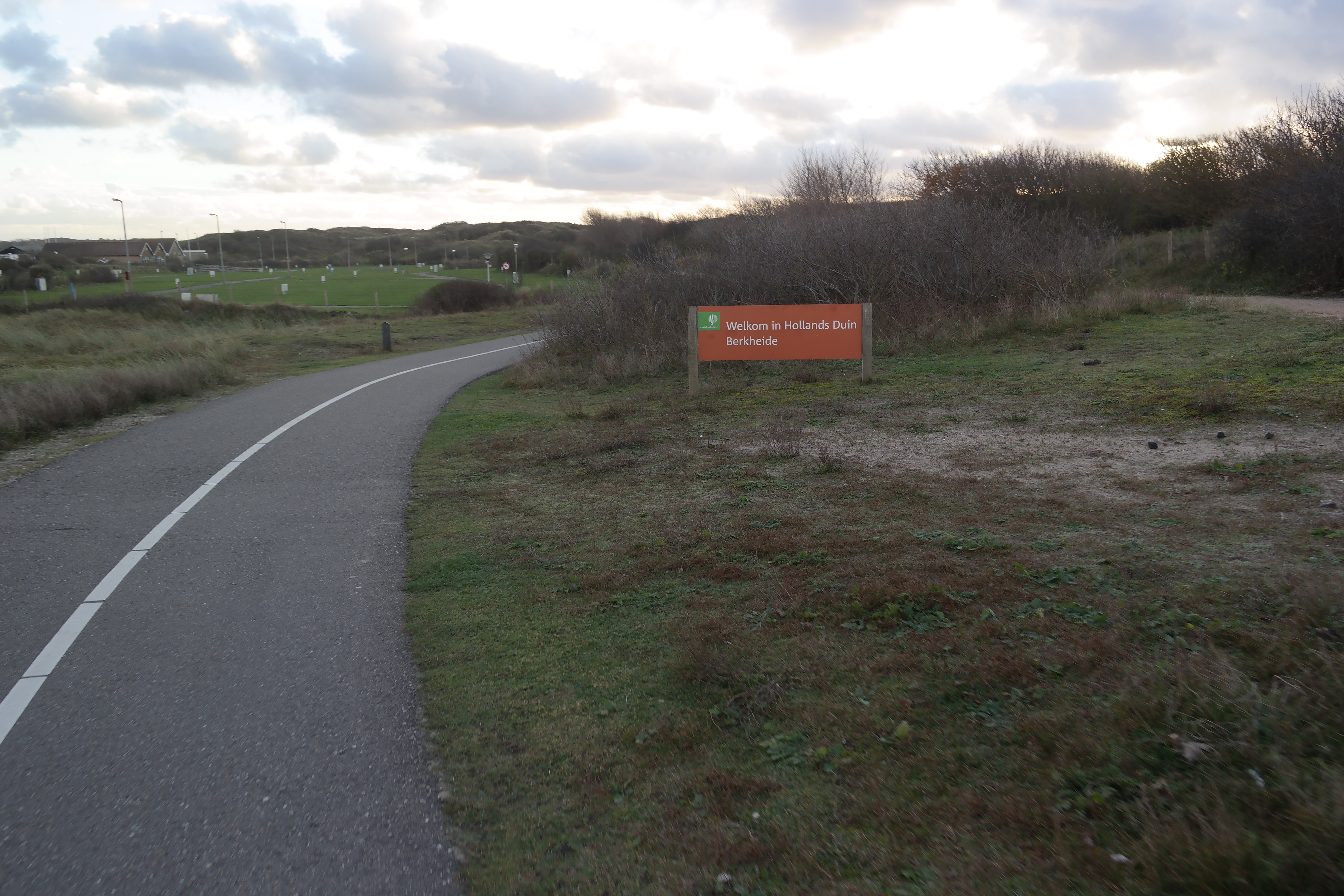 Natuurgebied Hollands Duin Berkheide nabij Katwijk aan Zee, november 2017.